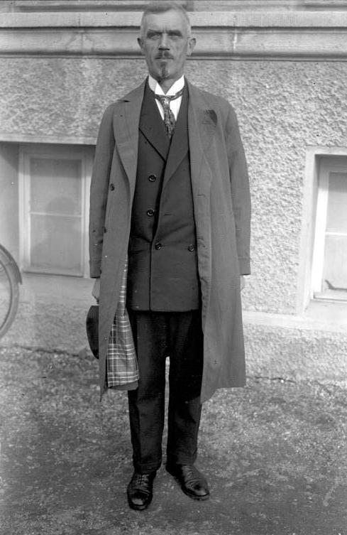 Zu der Notlandung des "Graf Zeppelin" auf seiner Amerikafahrt in Toulon/Frankreich! Dr. Dürr der Chef-Ingenieur des Luftschiffbaues und Konstrukteur des "Graf Zeppelin" hat sich nach Toulon begeben, um die Ursache der Notlandung festzustellen.